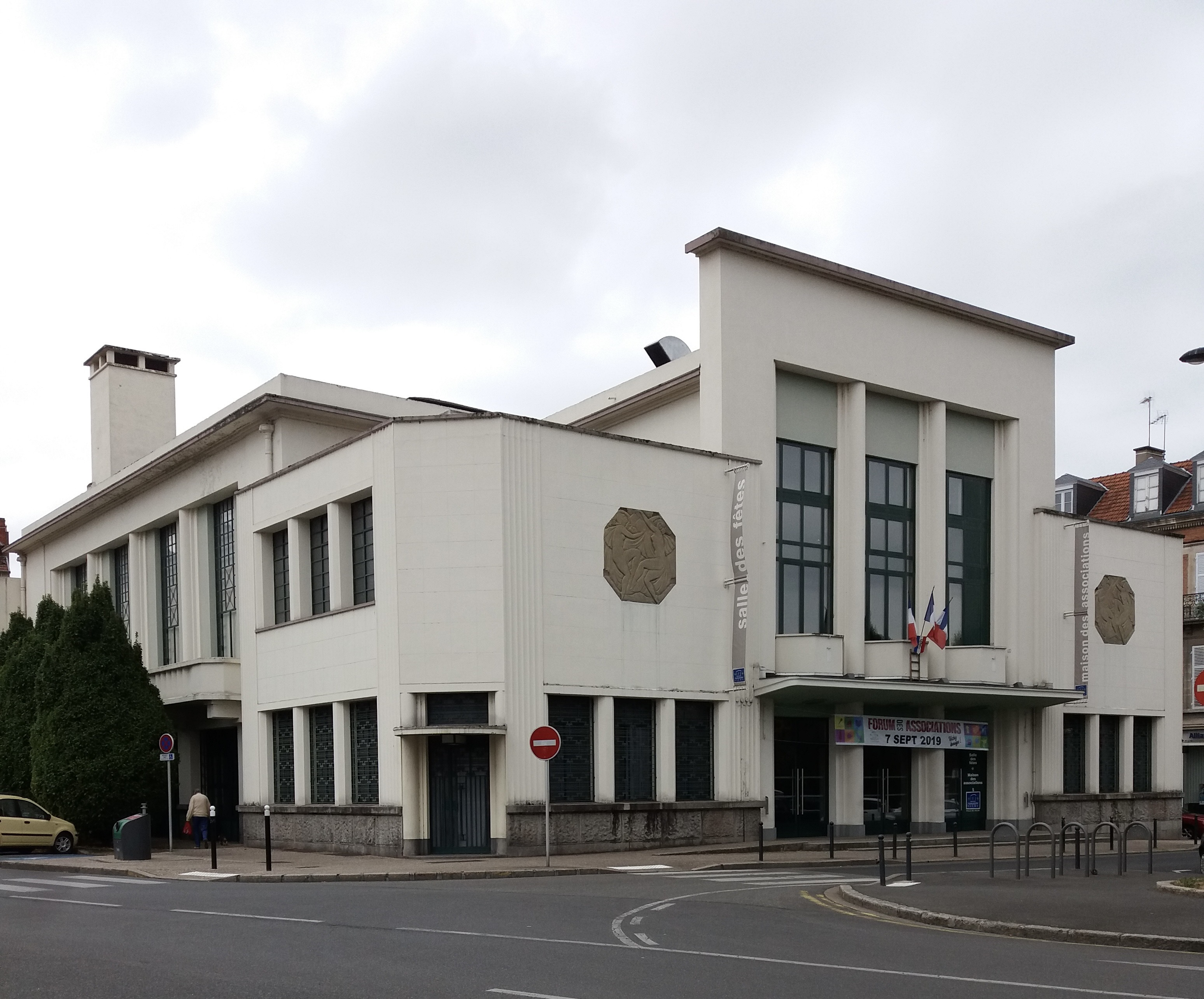 Maison des associations et salle des fêtes, terminée en 1935. Dessinée par une régie d'architectes vichissois. Les deux motifs de chaque côté sont de Pierre Fournier des Corats.